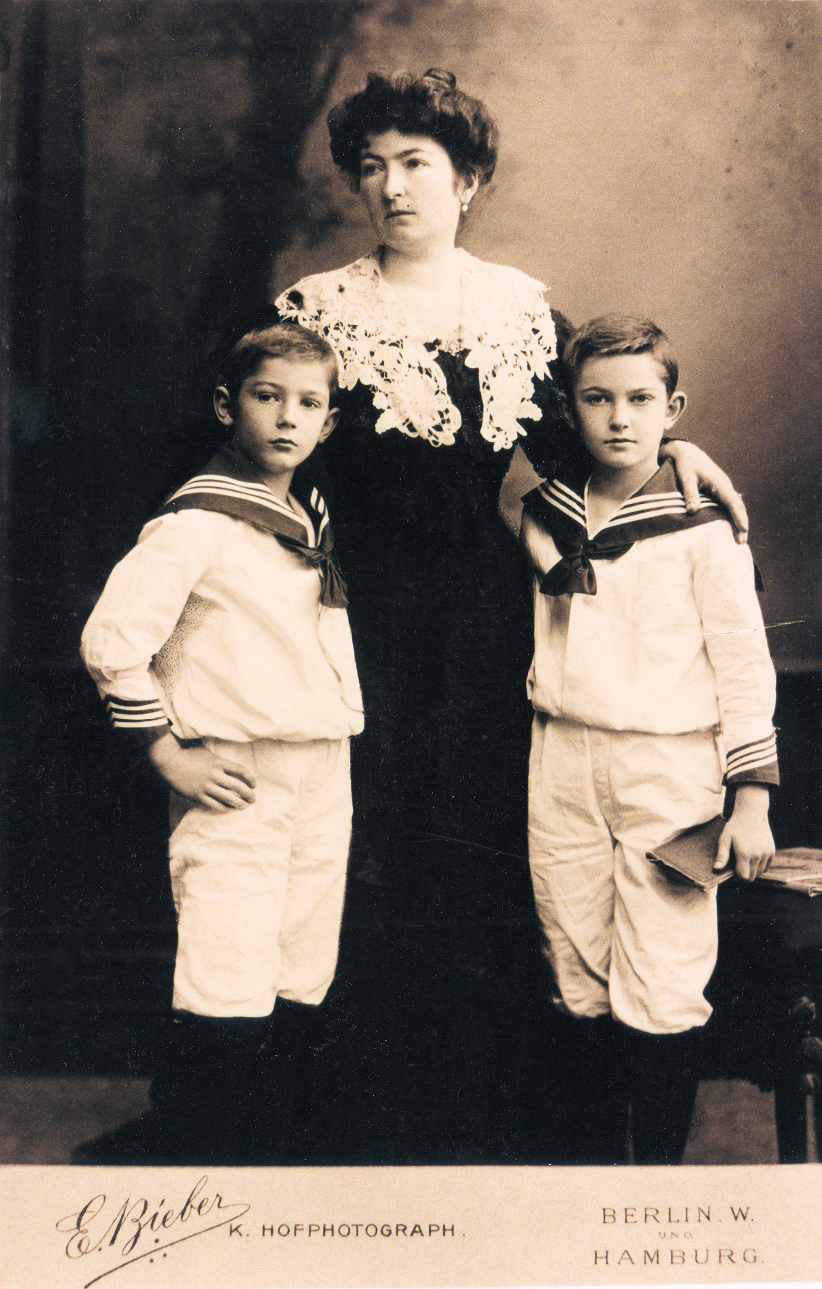 Das Foto zeigt Anna Möhring, Ehefrau von Bruno Möhring, und ihre Söhne Rudolf und Bruno, 1905